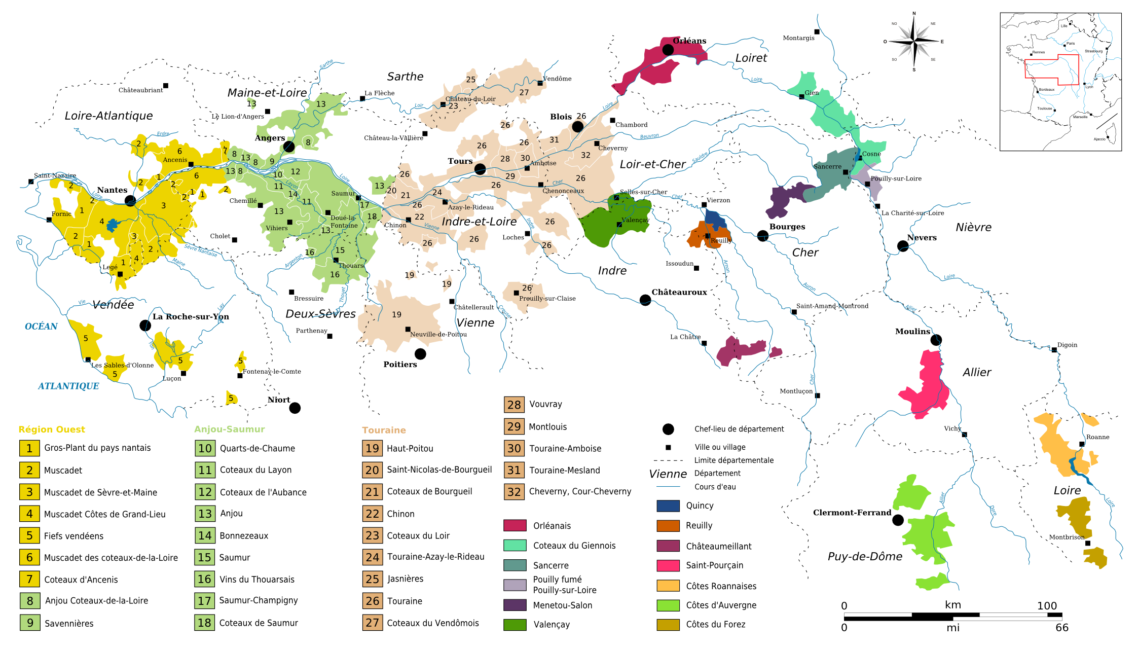 Les régions viticoles du Val de Loire